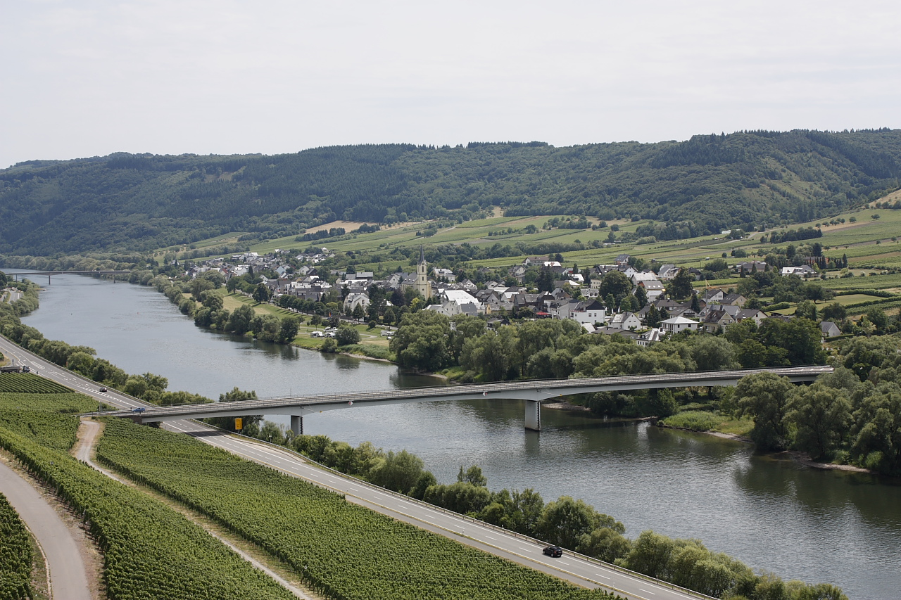 Die Moselbrücke bei Lösnich 2014